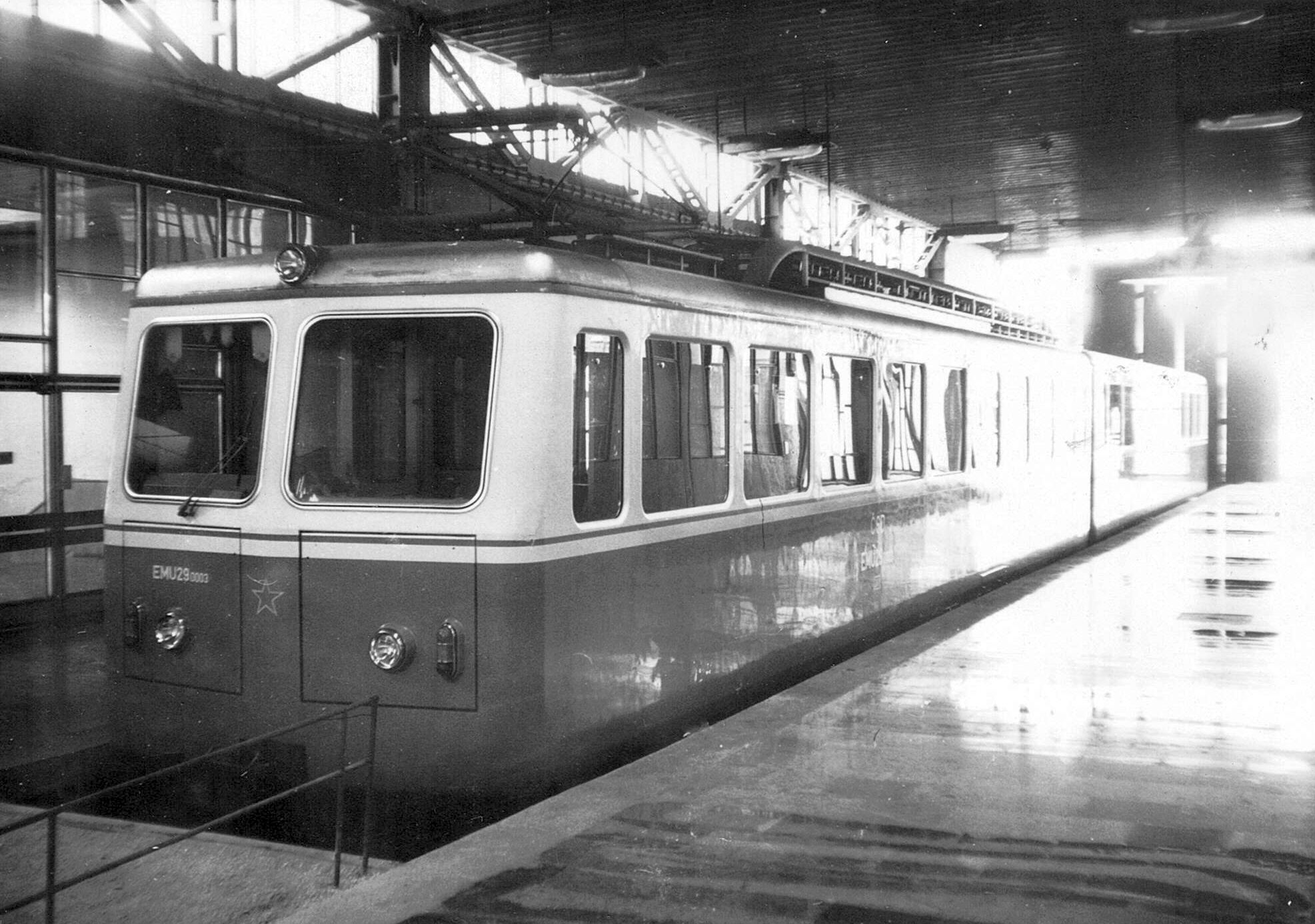 Ozubnicová jednotka řady 405.95 (EMU 29.0) na první koleji odděleného nástupiště OŽ ve Štrbě, Slovensko